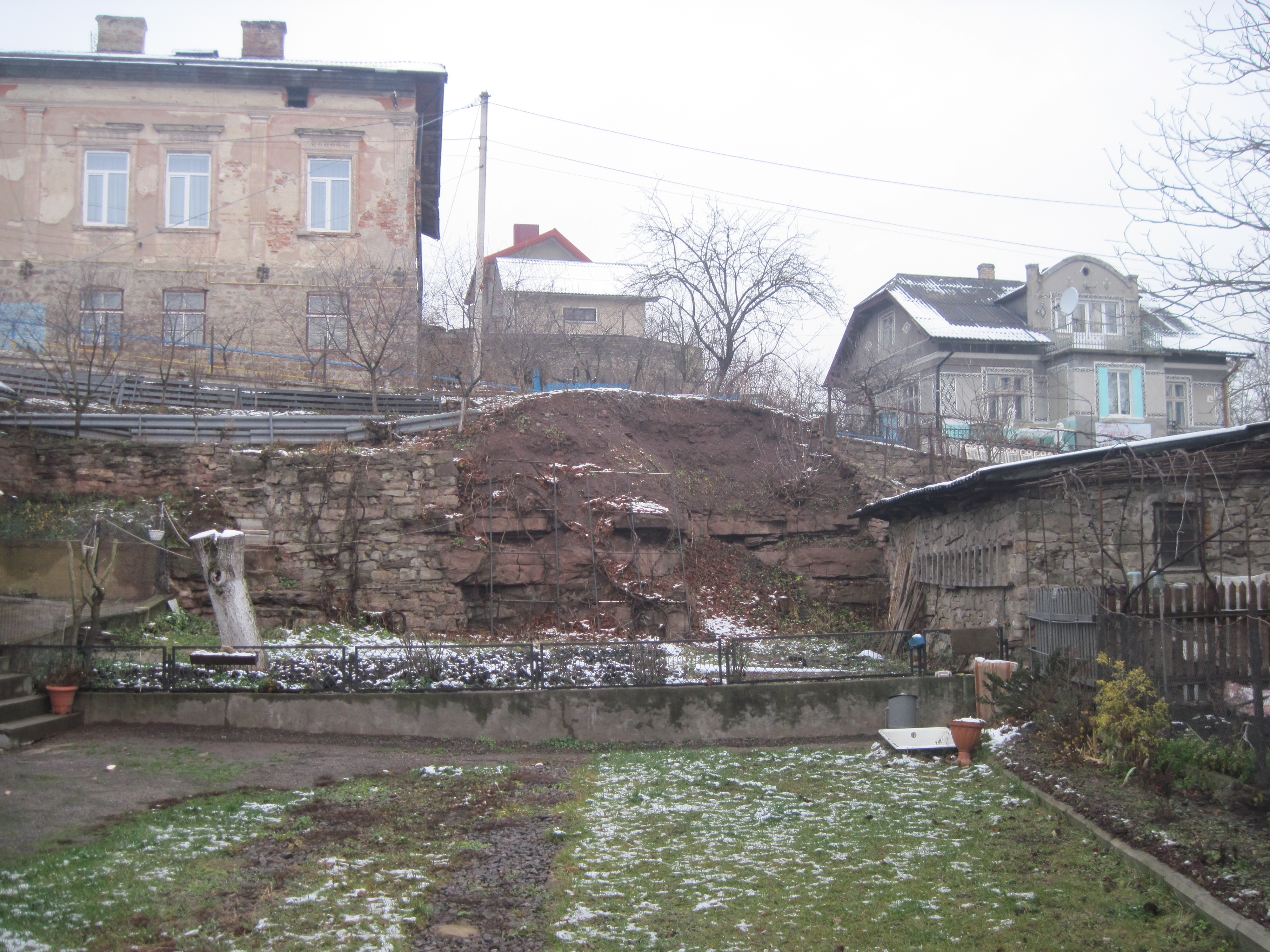 Скеляста порода коло церкви Миколая, Бучач, 2014